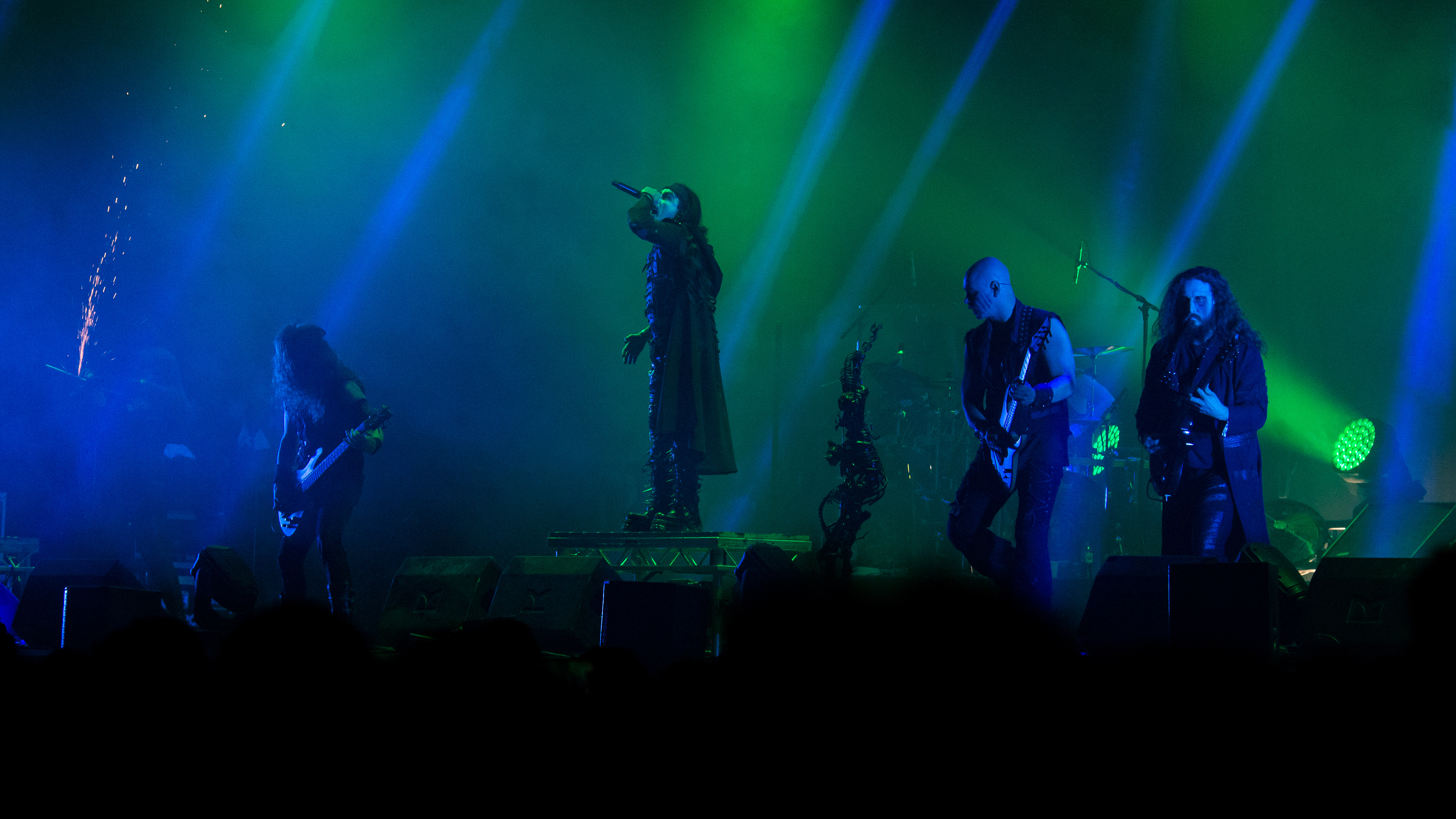 Concert du groupe britannique Cradle of Filth au Hellfest 2019.